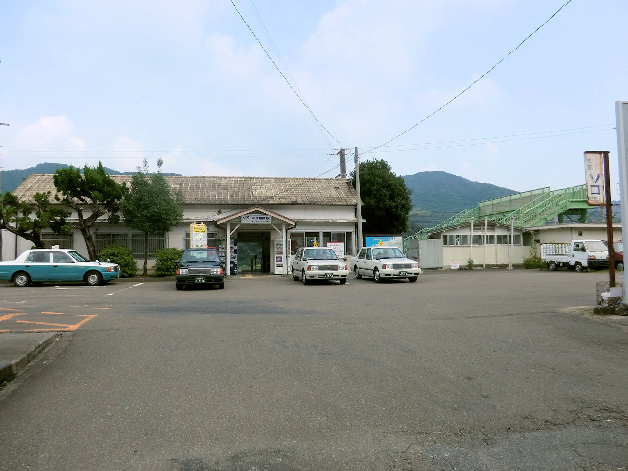 ＪＲ西日本紀伊由良駅